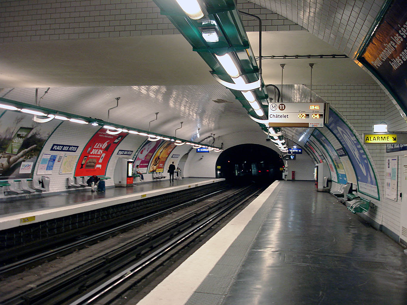 Station Place des Fêtes, de la ligne 11 du métro de Paris, France.